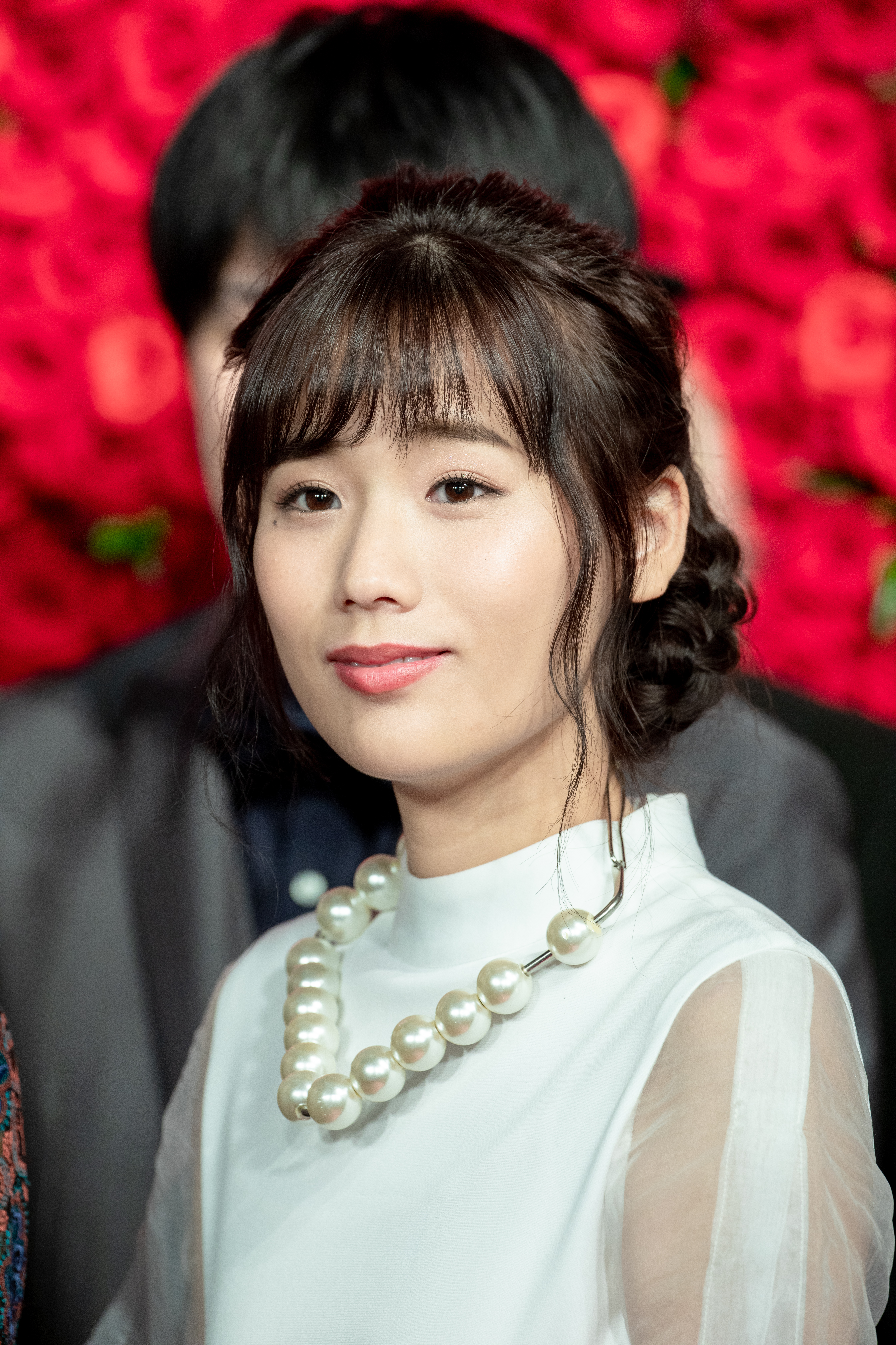 第30回 東京国際映画祭 オープニングセレモニー 秋山ゆずき (カメラを止めるな!)